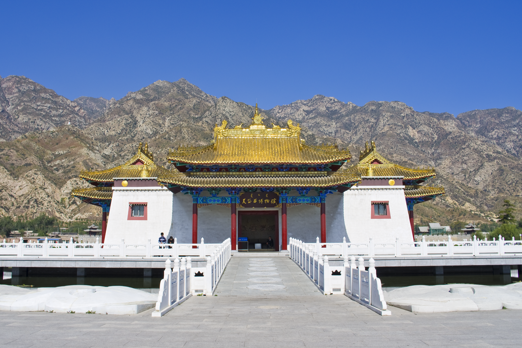 中文（中国大陆）: 美岱召博物馆正面